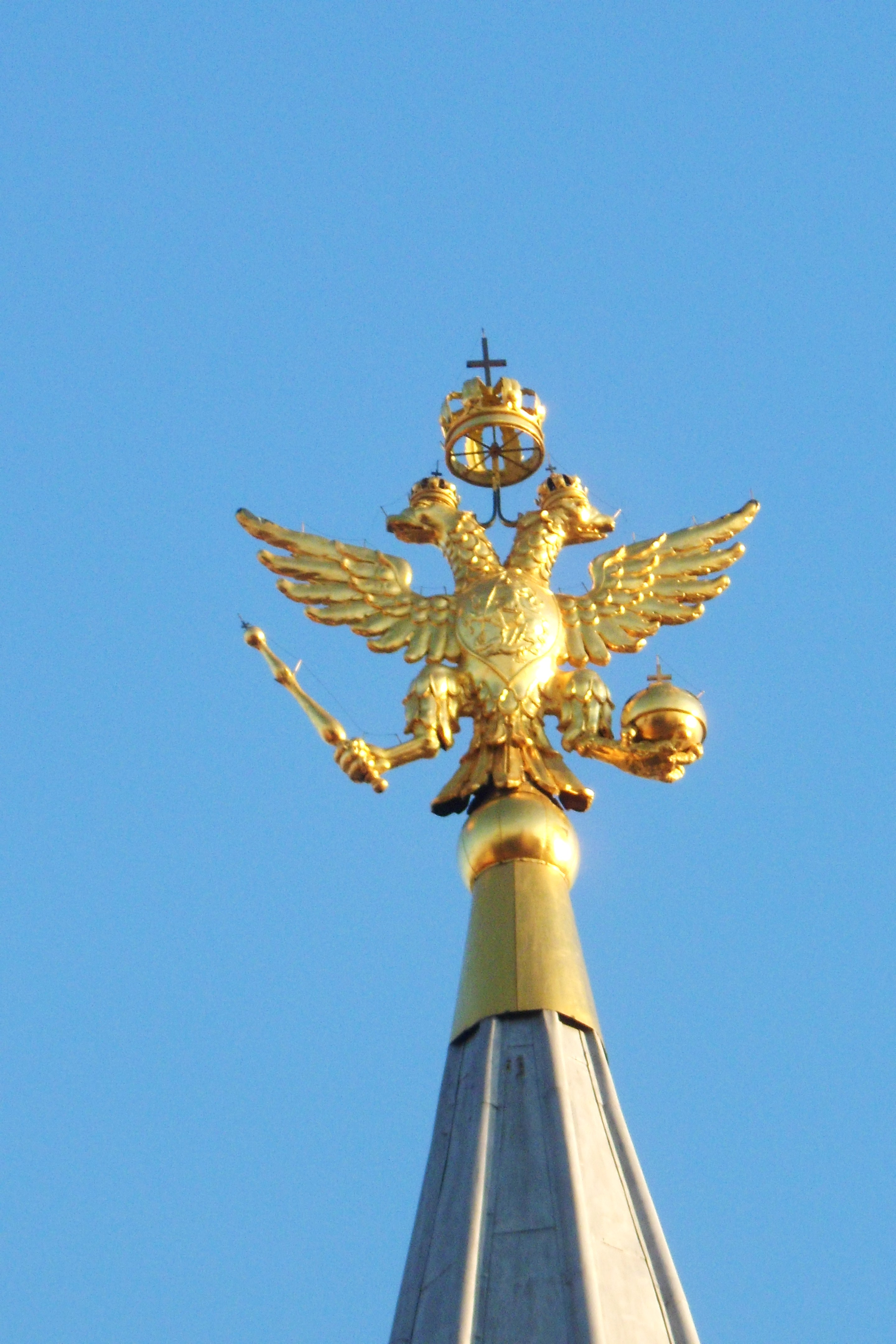 Скульптура двуглавого орла на крыше Государственного Исторического музея в Москве.